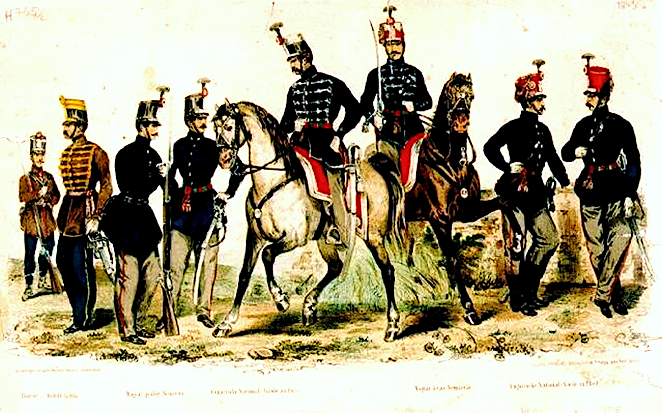 Nemzetőrségi viselet (korabeli, színezett kép)